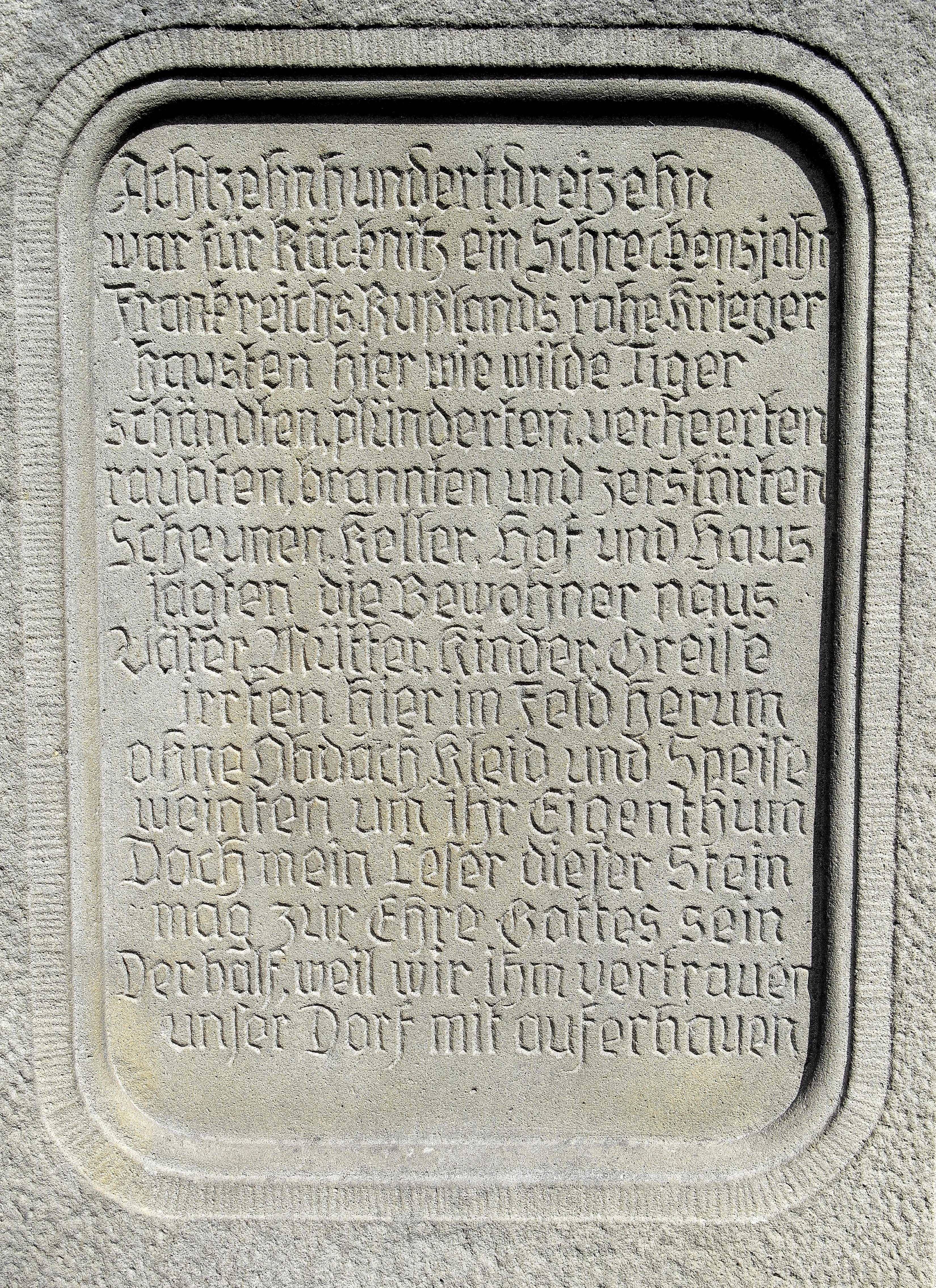 Dresden, Denkmal 1813 Schlacht bei Dresden, Rächnitzhöhe